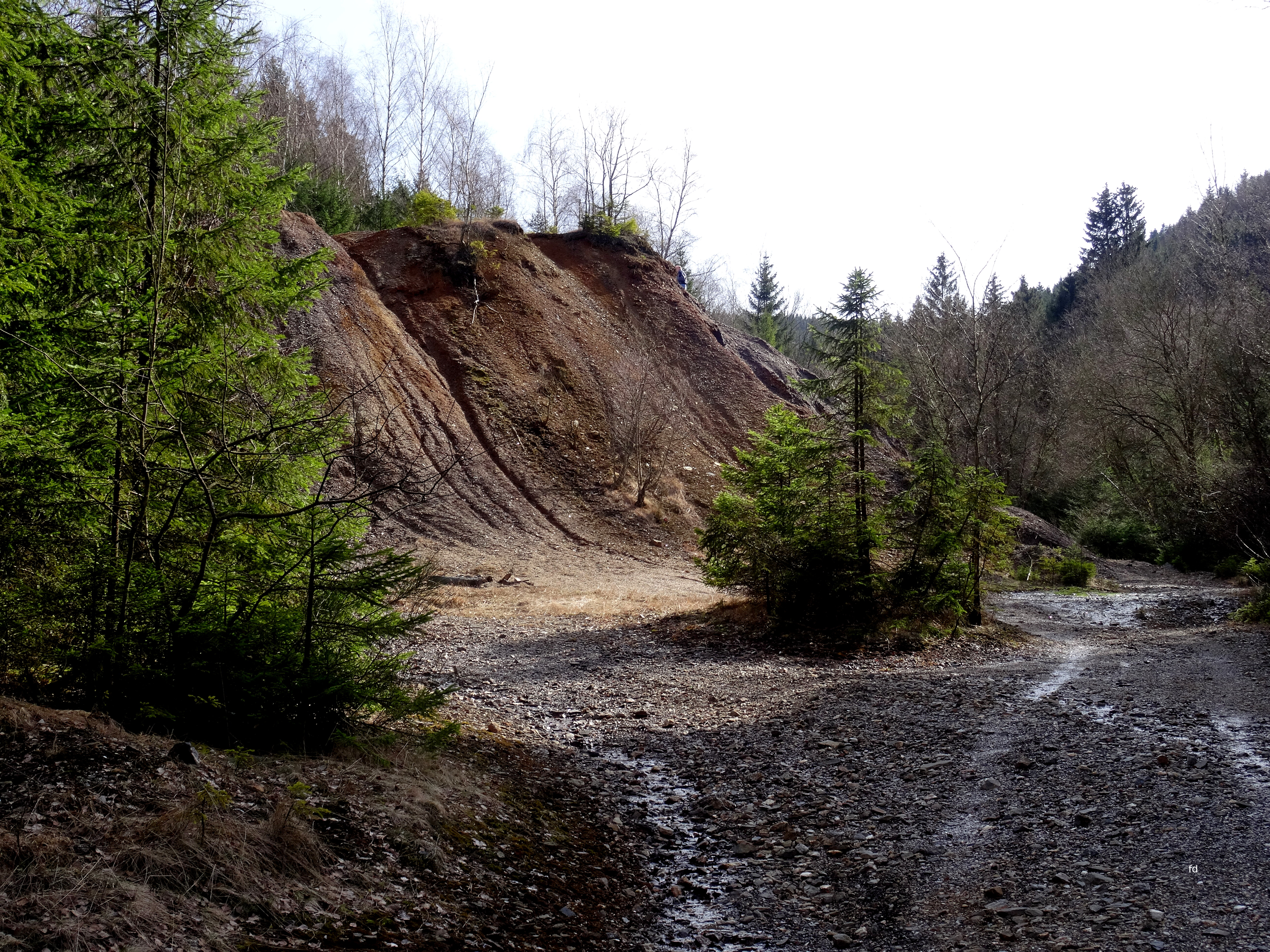 NSG Abraumhalden der Grube Alexander südlich von Blüggelscheid